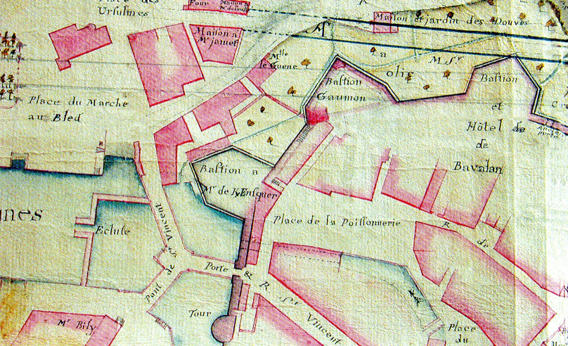 Plan d'alignement des bastions sud-ouest des remparts de Vannes daté du 18ème siècle